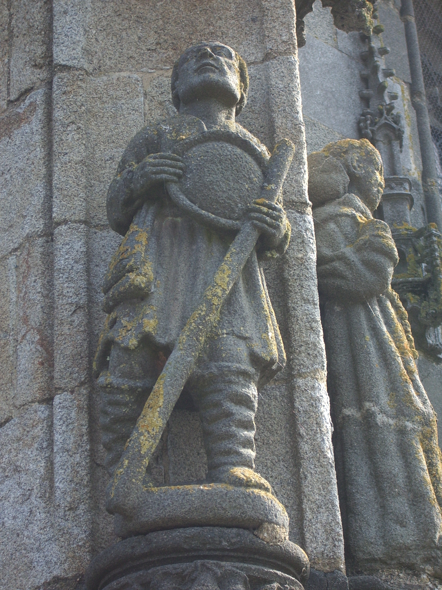 Salaun ar Foll, sanctuaire Notre-Dame du Folgoët, Bretagne, Finistère Nord